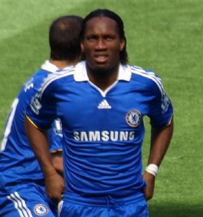 Didier Drogba